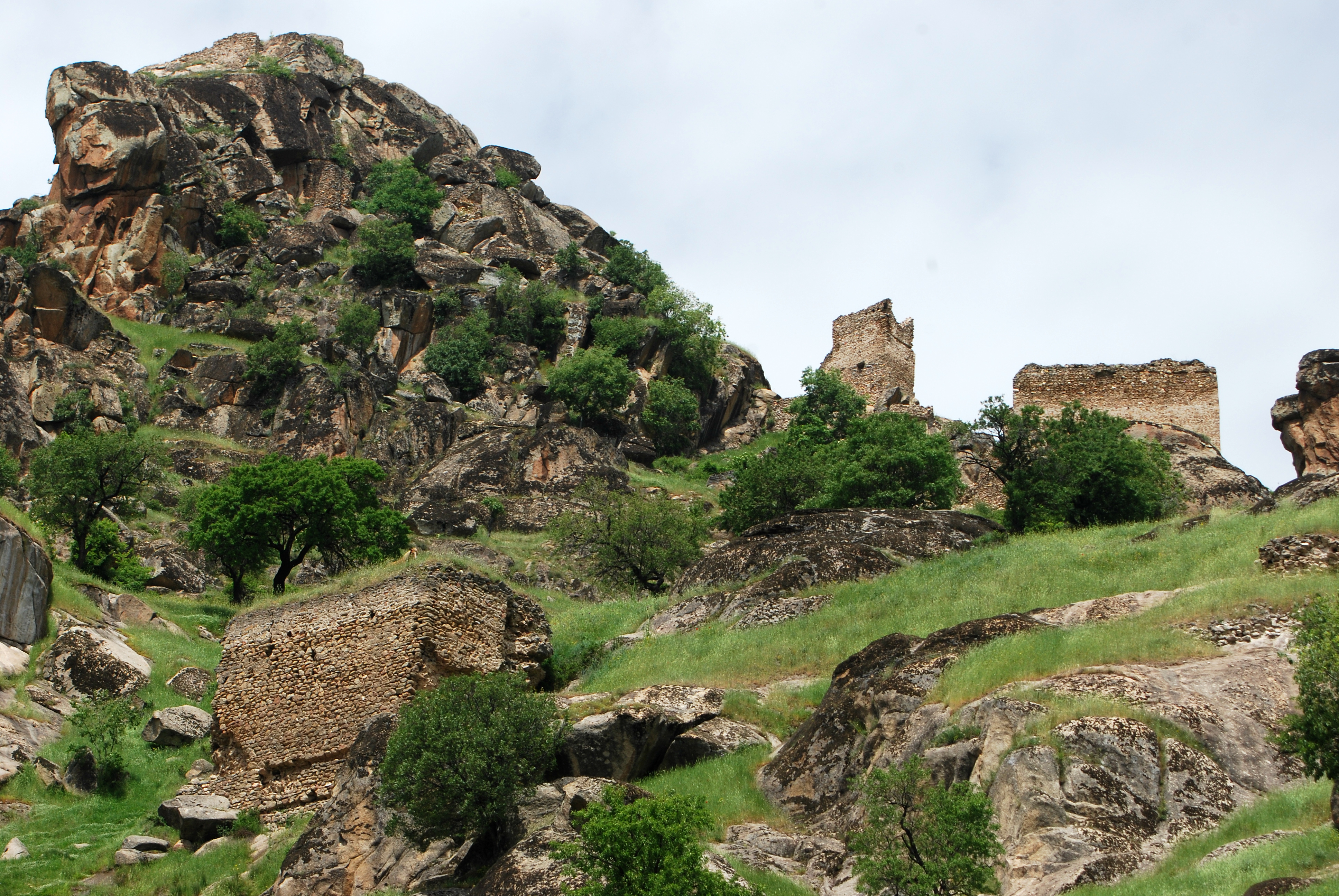 Маркови Кули, Прилеп.